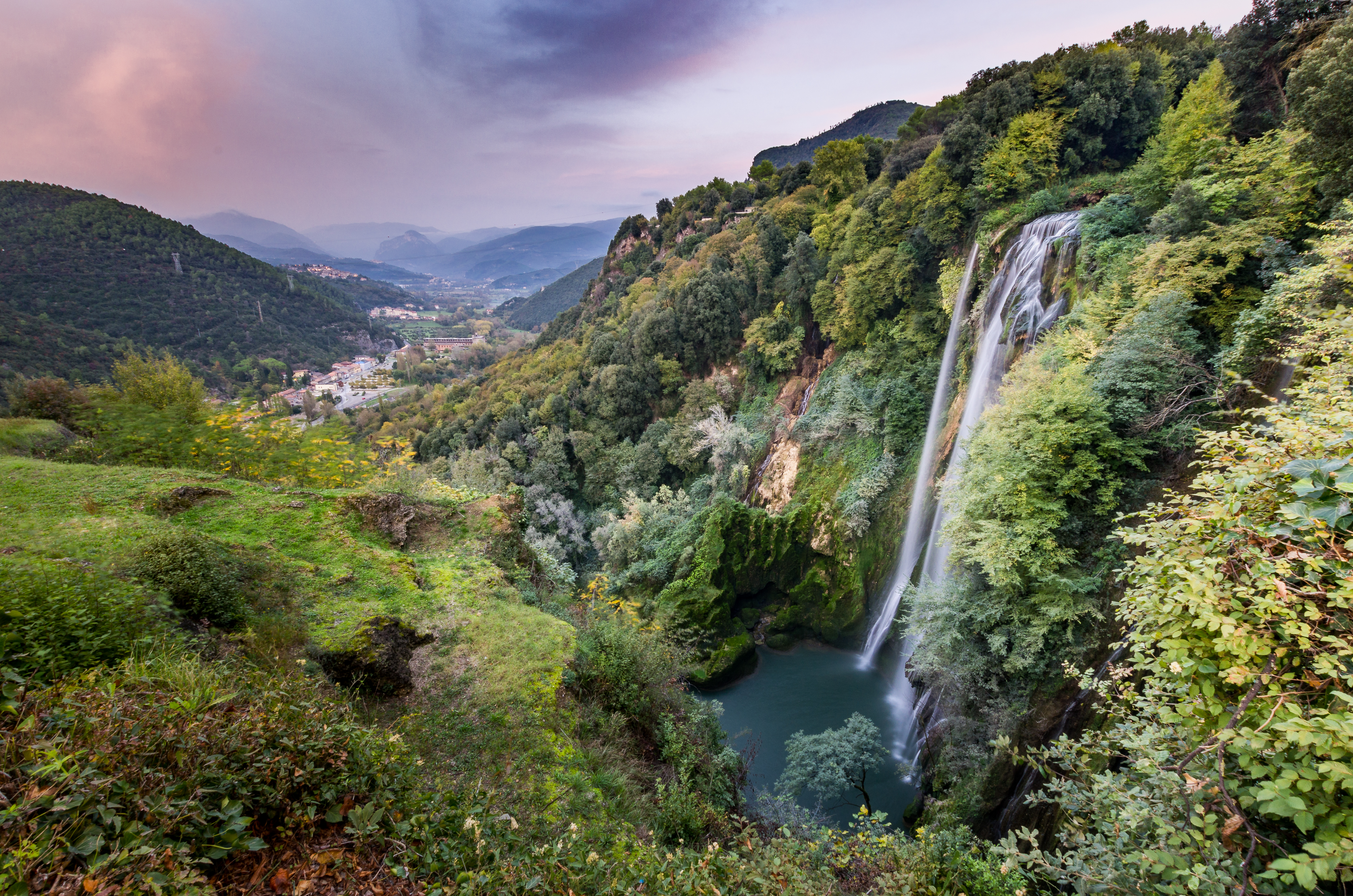 Cascata di Terni (durante l'orario odierno di chiusura serale).